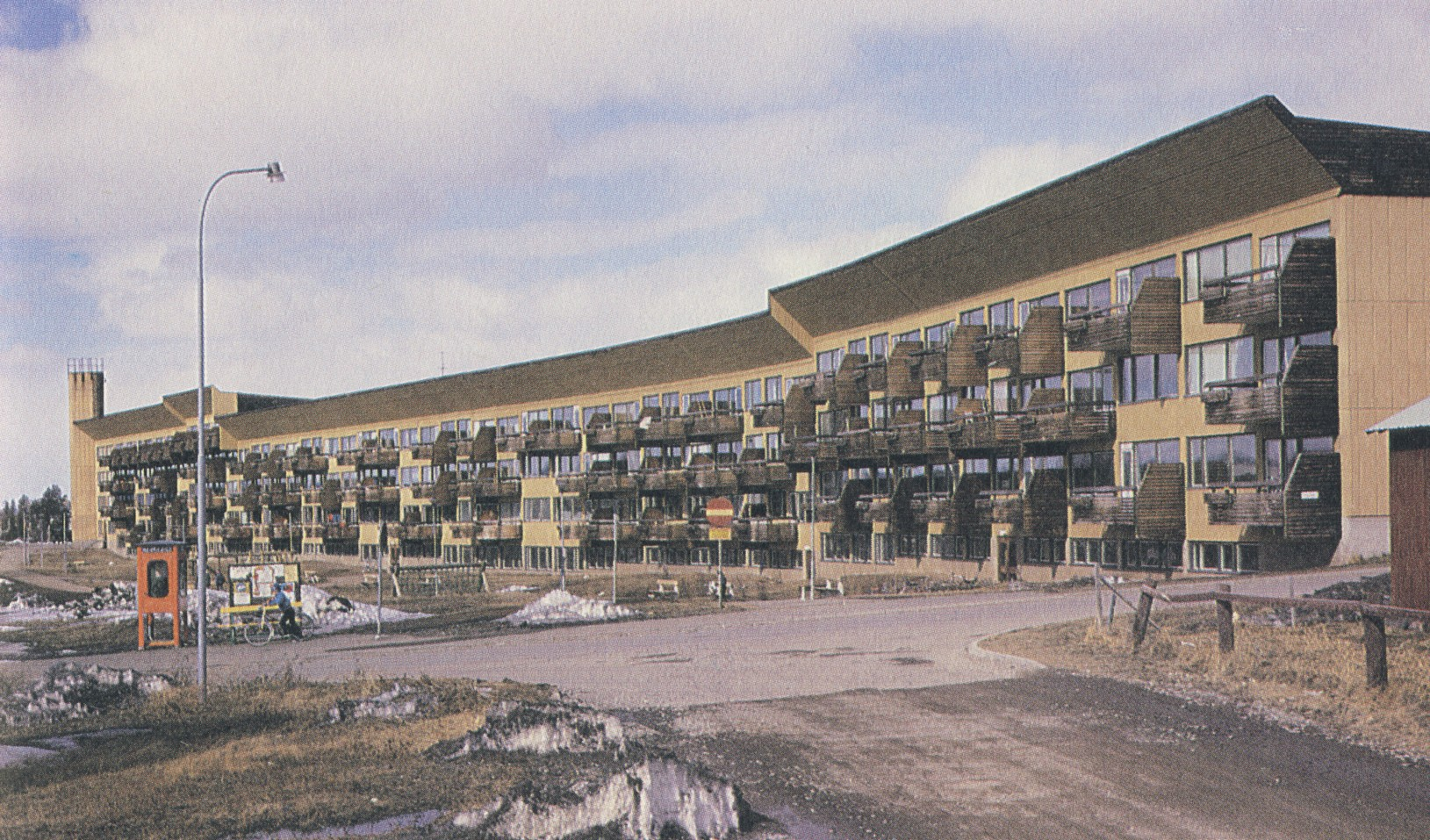 Bostadsområde "Ormen långe" i Svappavaara (av Ralph Erskine)